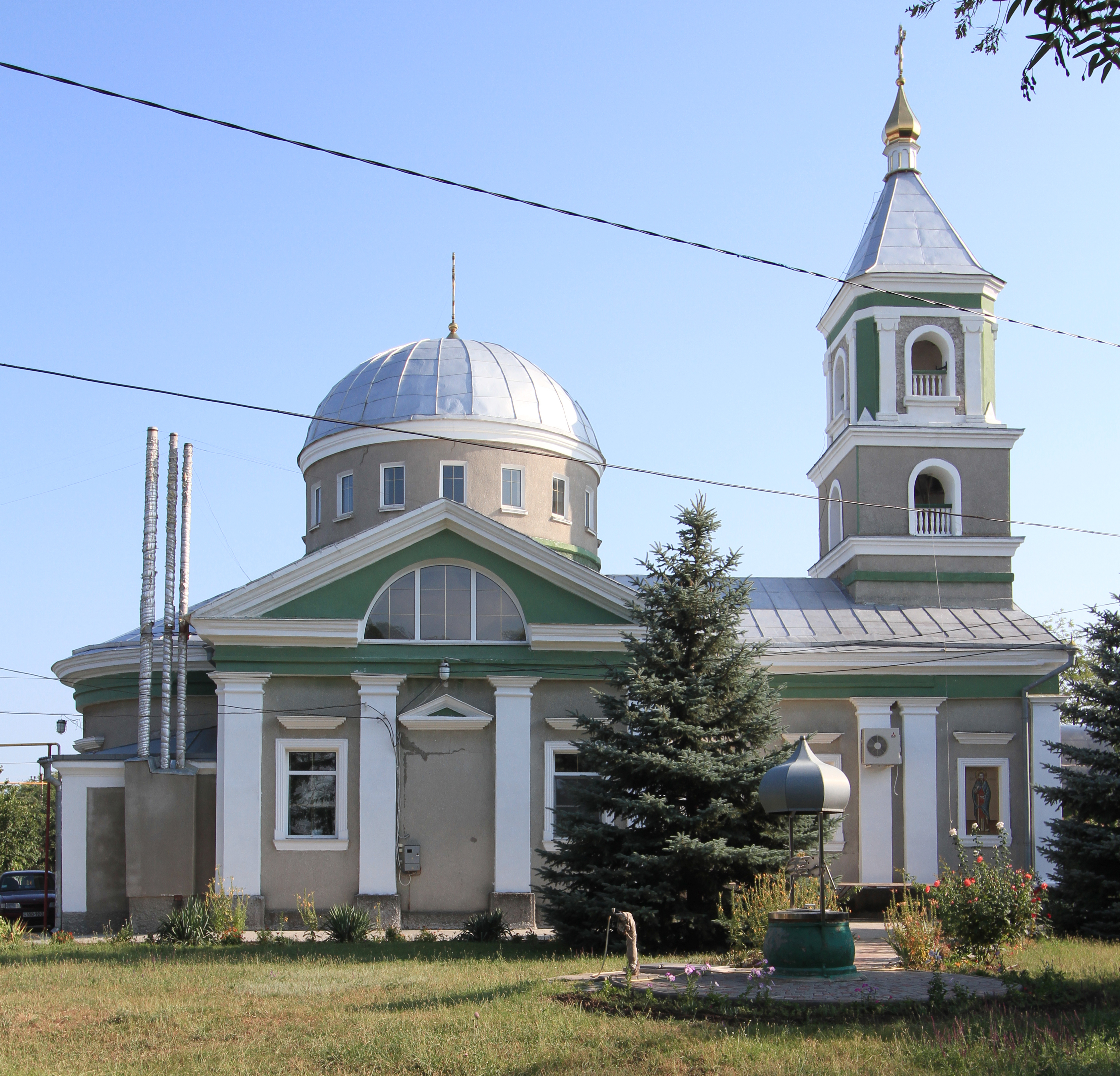 Вознесенська церква , с. Нерубайське